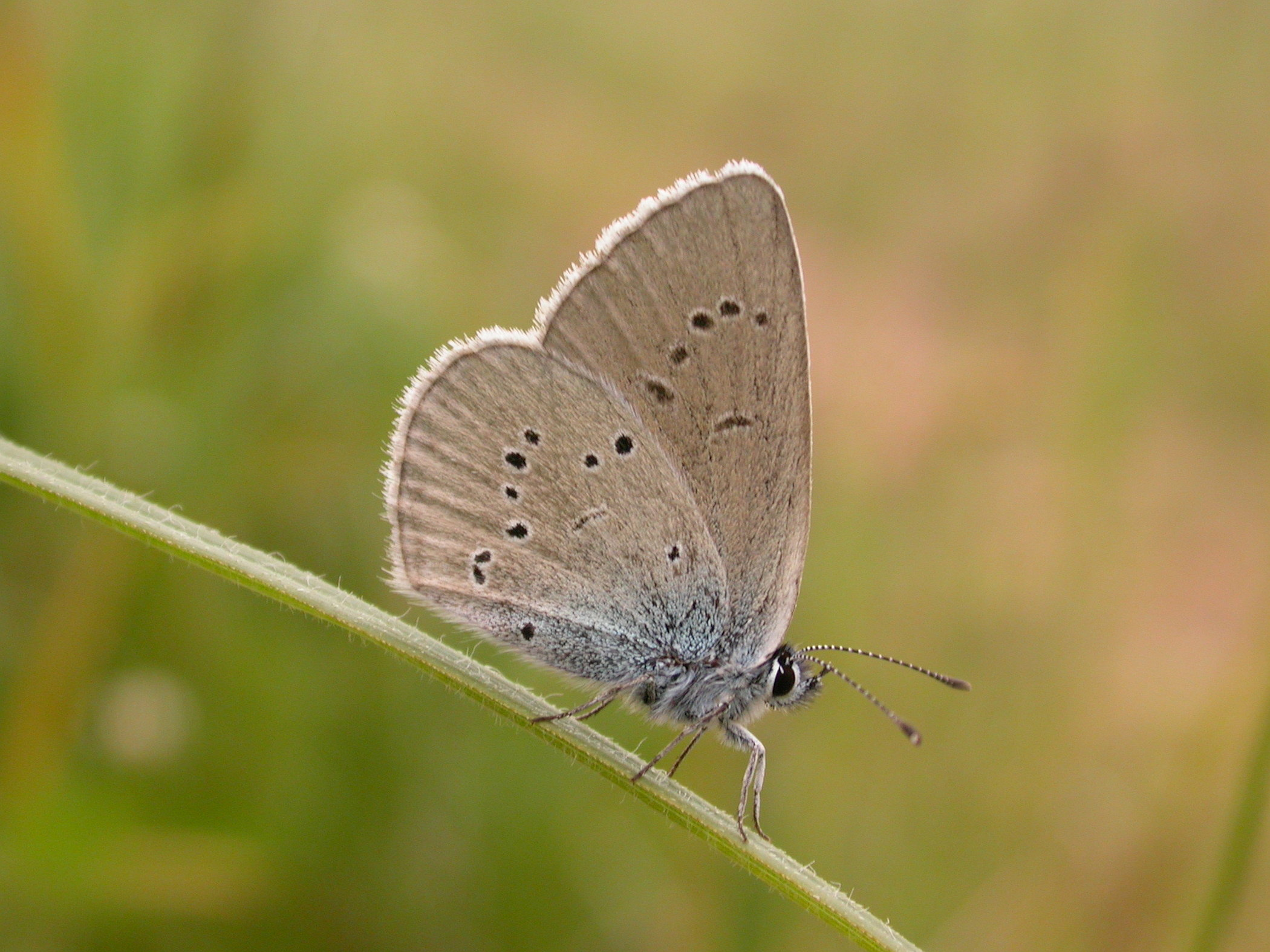 Polyommatus semiargus/Cyaniris semiargus (Lycaenidae). Les Ponts-de-Martel, Switzerland.